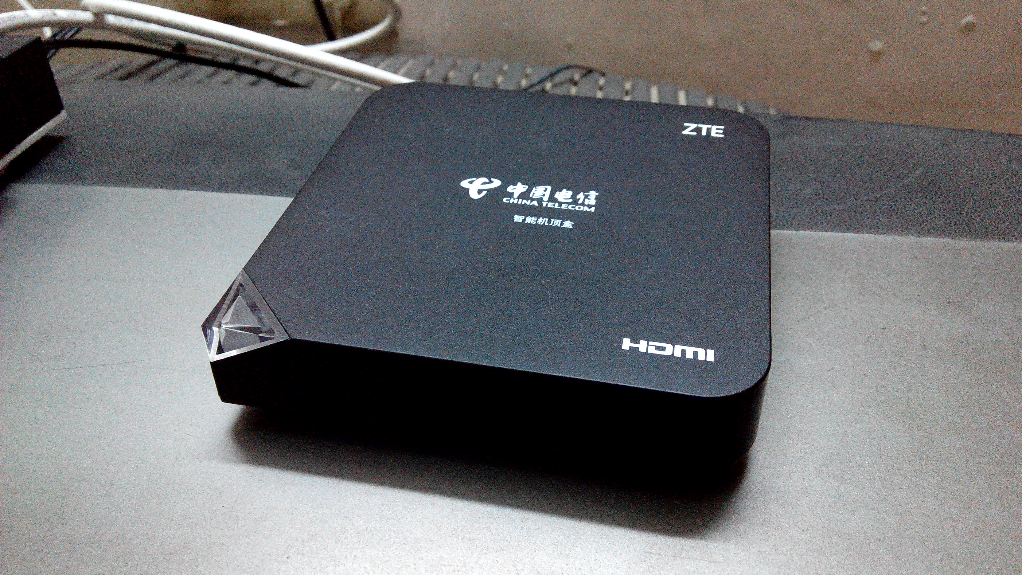 中国电信IPTV 广东江门地区的机顶盒样式